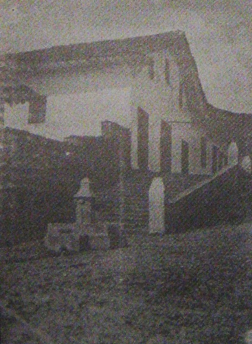 Antigua fachada de la Capilla del Carmen, mas conocida como Capilla de San Luis, la cual fue por muchos años el templo parroquial de Yarumal mientras se construía la Iglesia de la Merced. Antioquia, Colombia.